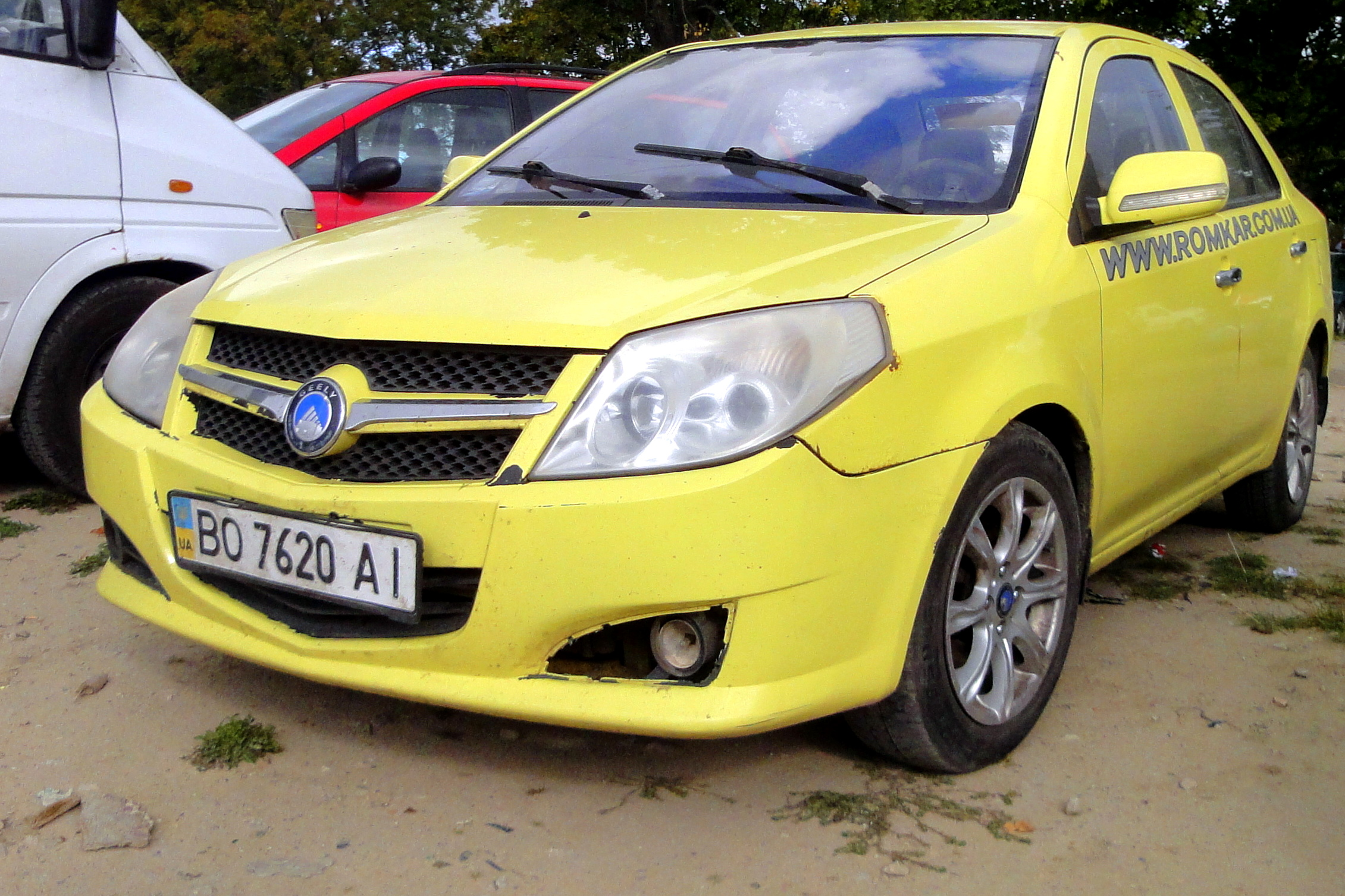 Geely MK, sedan chińskiego producenta samochodów z Taizhou.